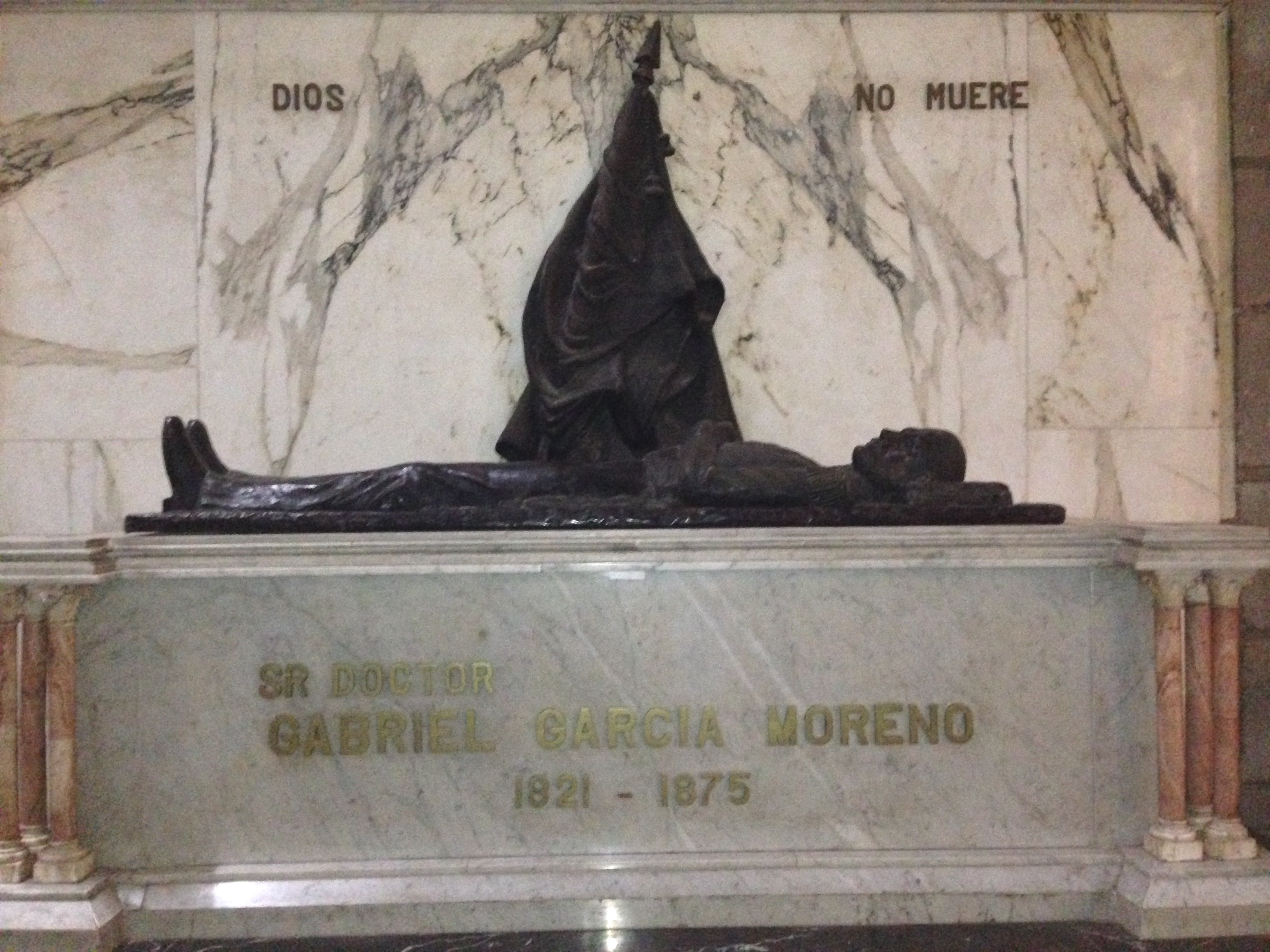 Tumba en donde se encuentran los restos del Dr. Gabriel García Moreno